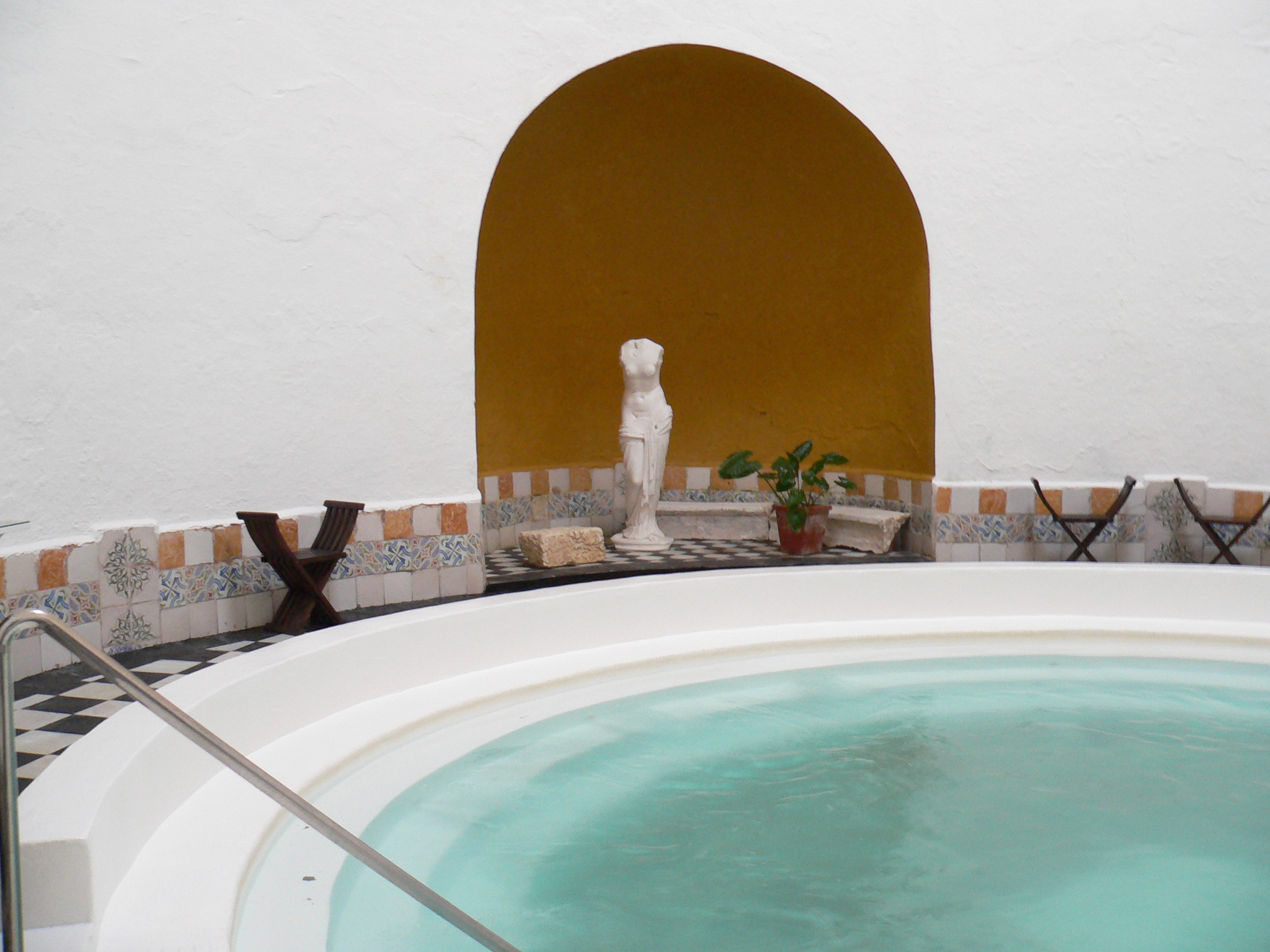 Piscina de las termas romanas de Alange, que forman parte del conjunto monumental de Mérida.